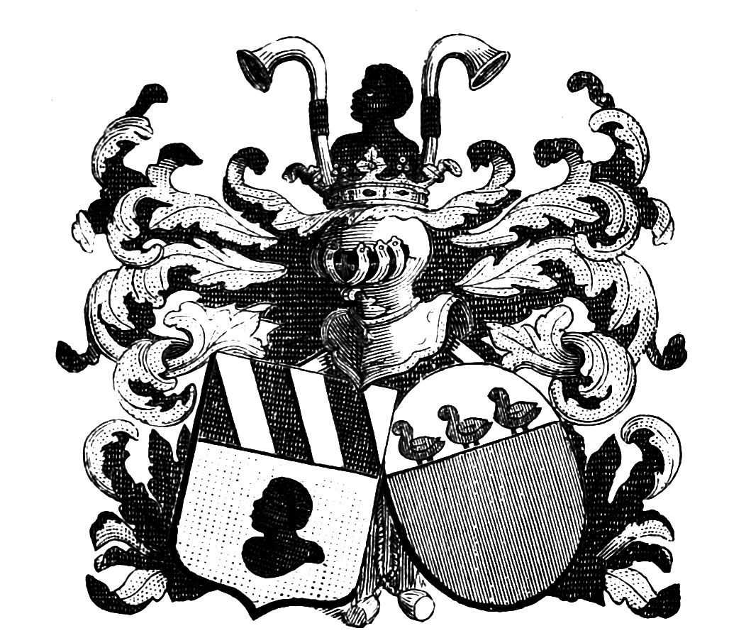 Wapen Ambrosius Tucher, Ritter. + Mary d' Ursel, St. Jacobs- Antw